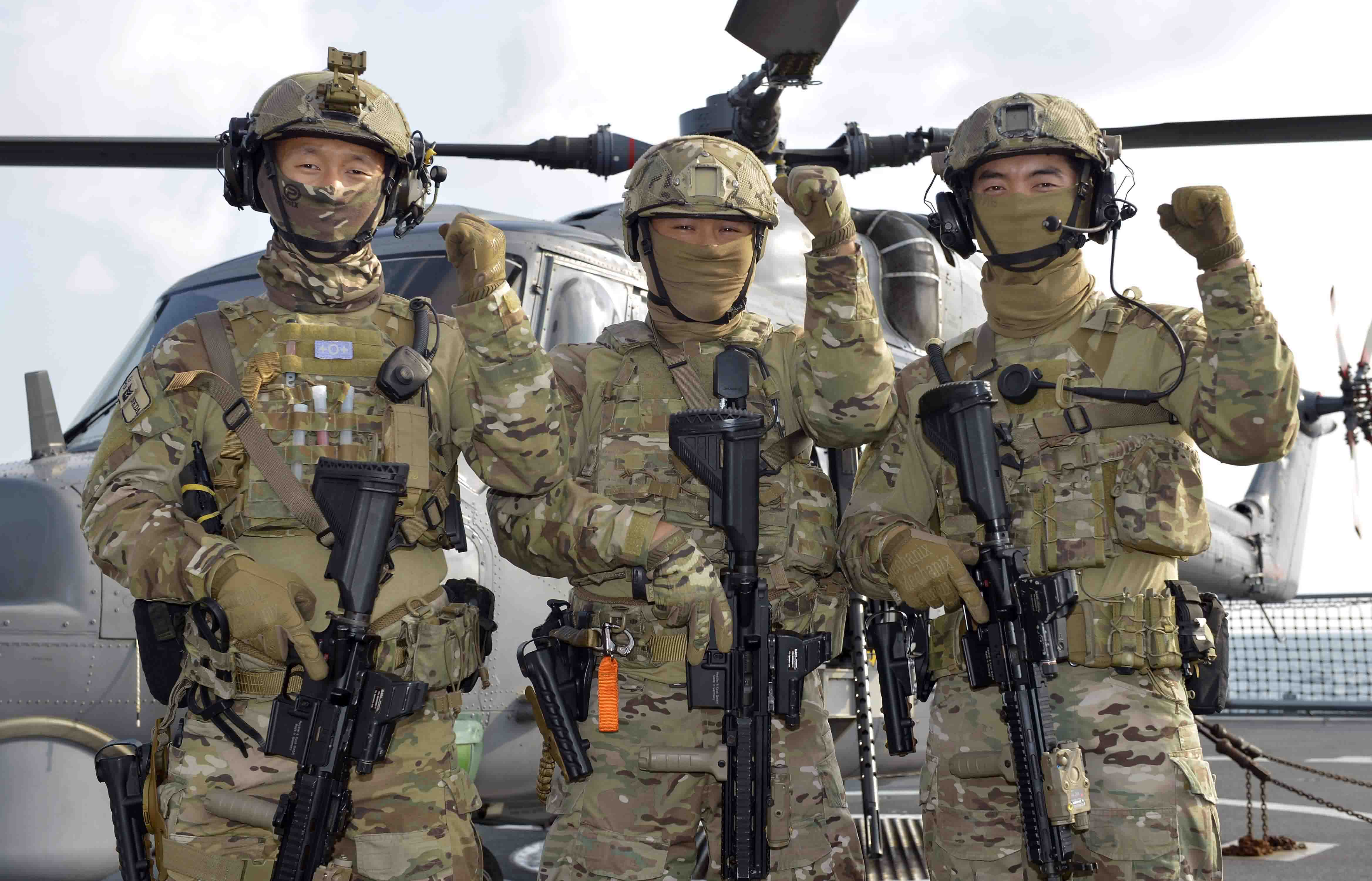 아덴만 5주년 그때 그 사람들은 (1)